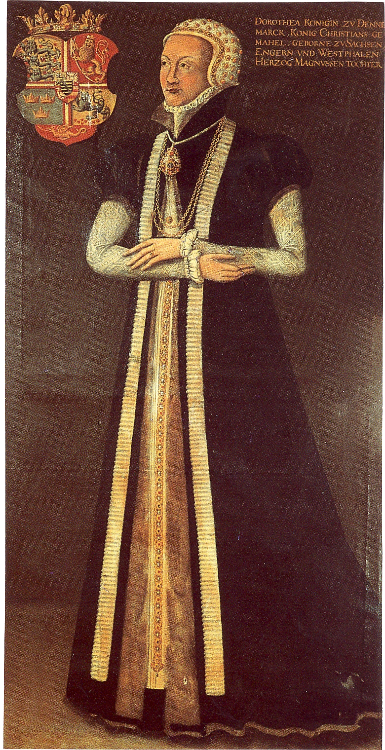 Dorothea von Sachsen-Lauenburg, Frau von Christian III. (Dänemark und Norwegen)